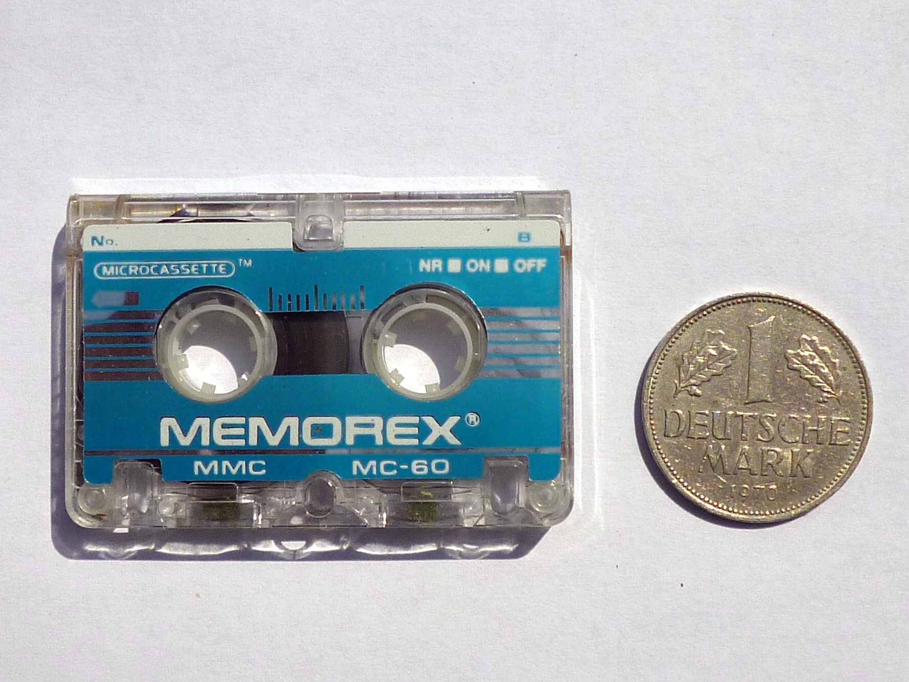 Mikrokaseta MC-60 MEMOREX (ang.Microcassette)